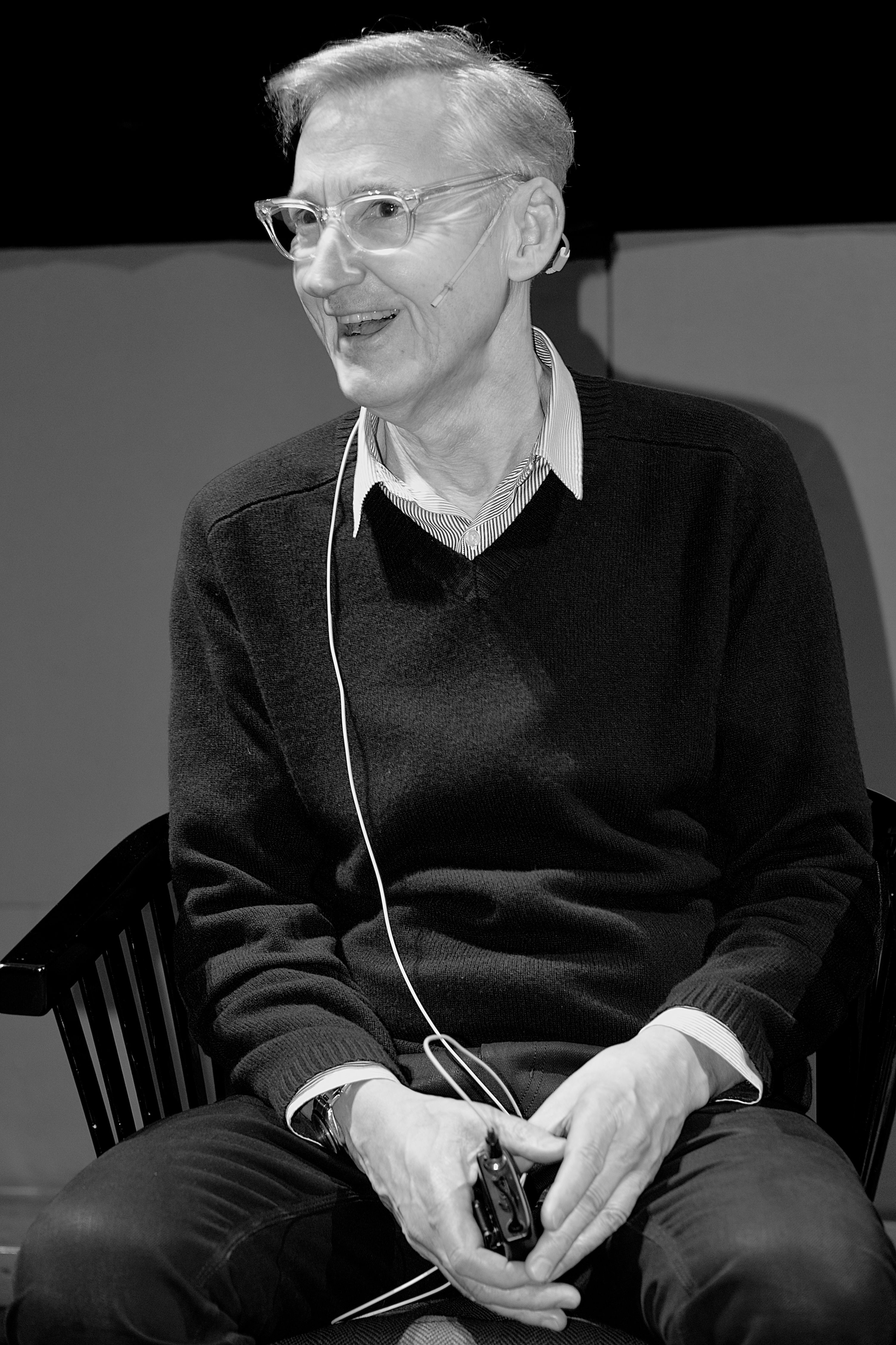 Tom Hedqvist i ett framträdande på Nationalmuseet i Stockholm om museets framtid, den 2 februari 2013.